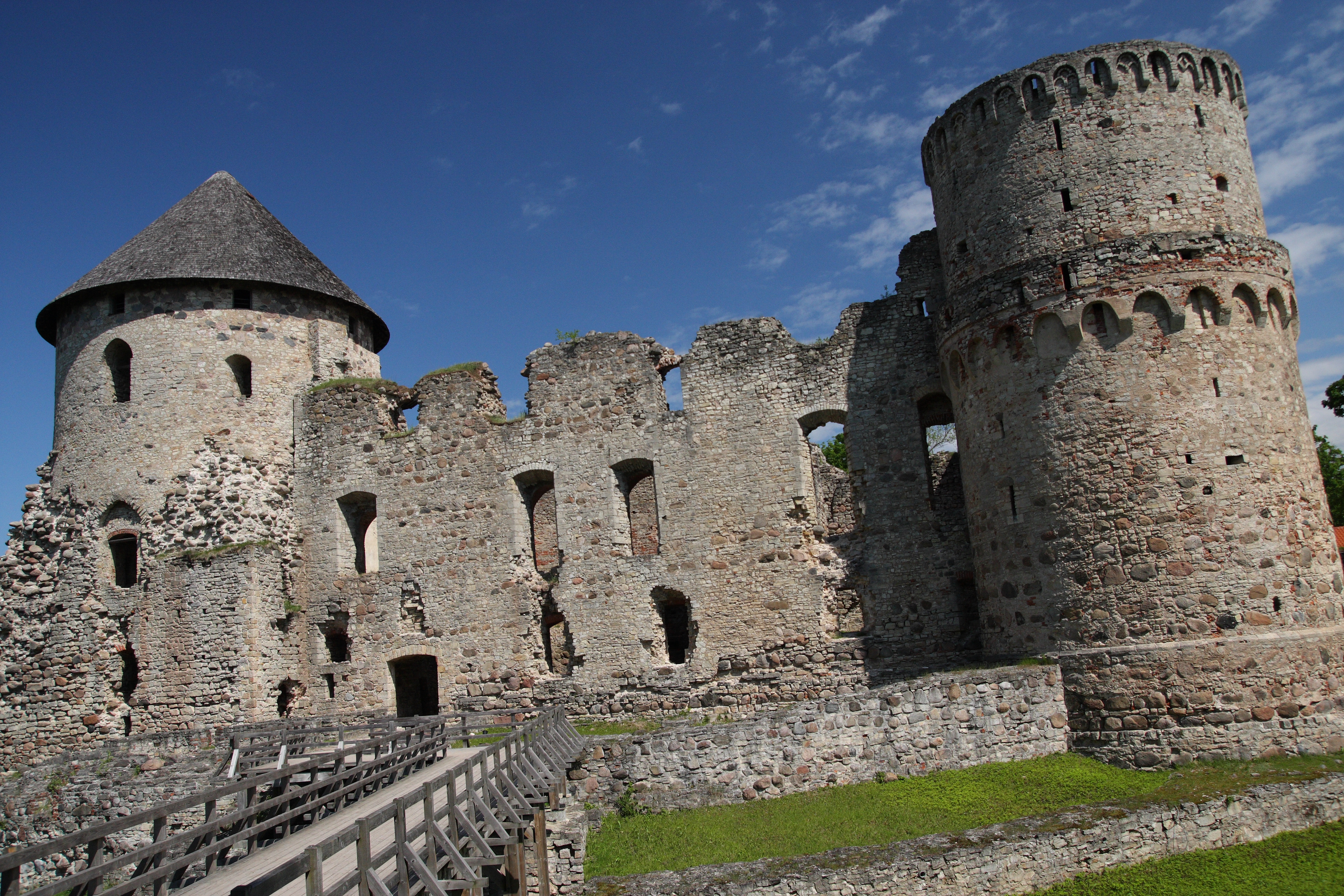 Cesis, Latvia